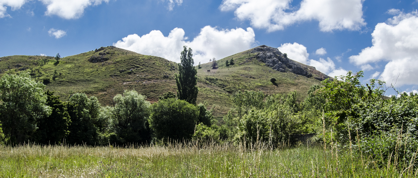 Hormicedo. Panorámica del campo. España.